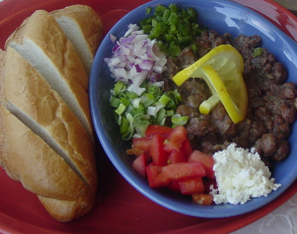 Shahan ful presented alongside olive oil, berbere and various vegetables.